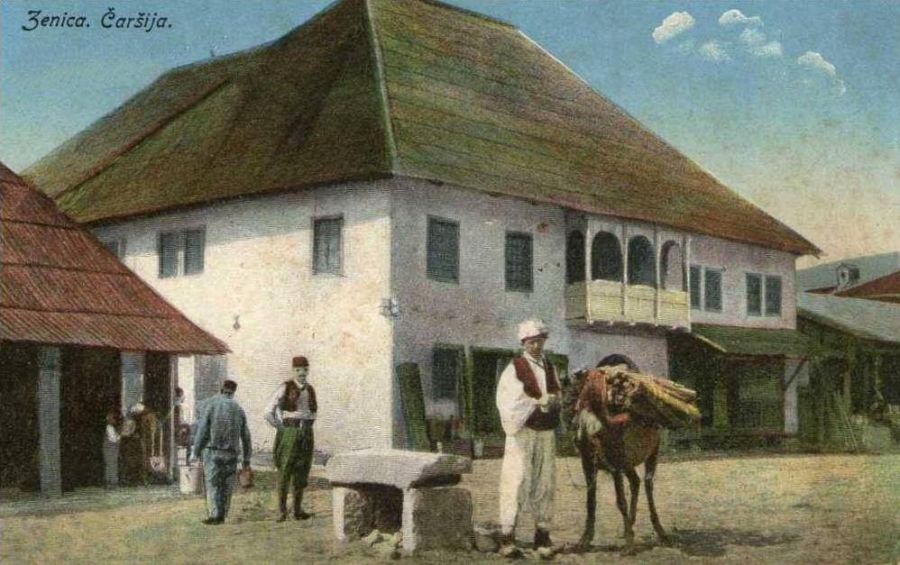 Бивши Сердаревића или Херцегов хан, срушен 1927. године. Налазио се преко пута данашње Хаџи Мазића куће.